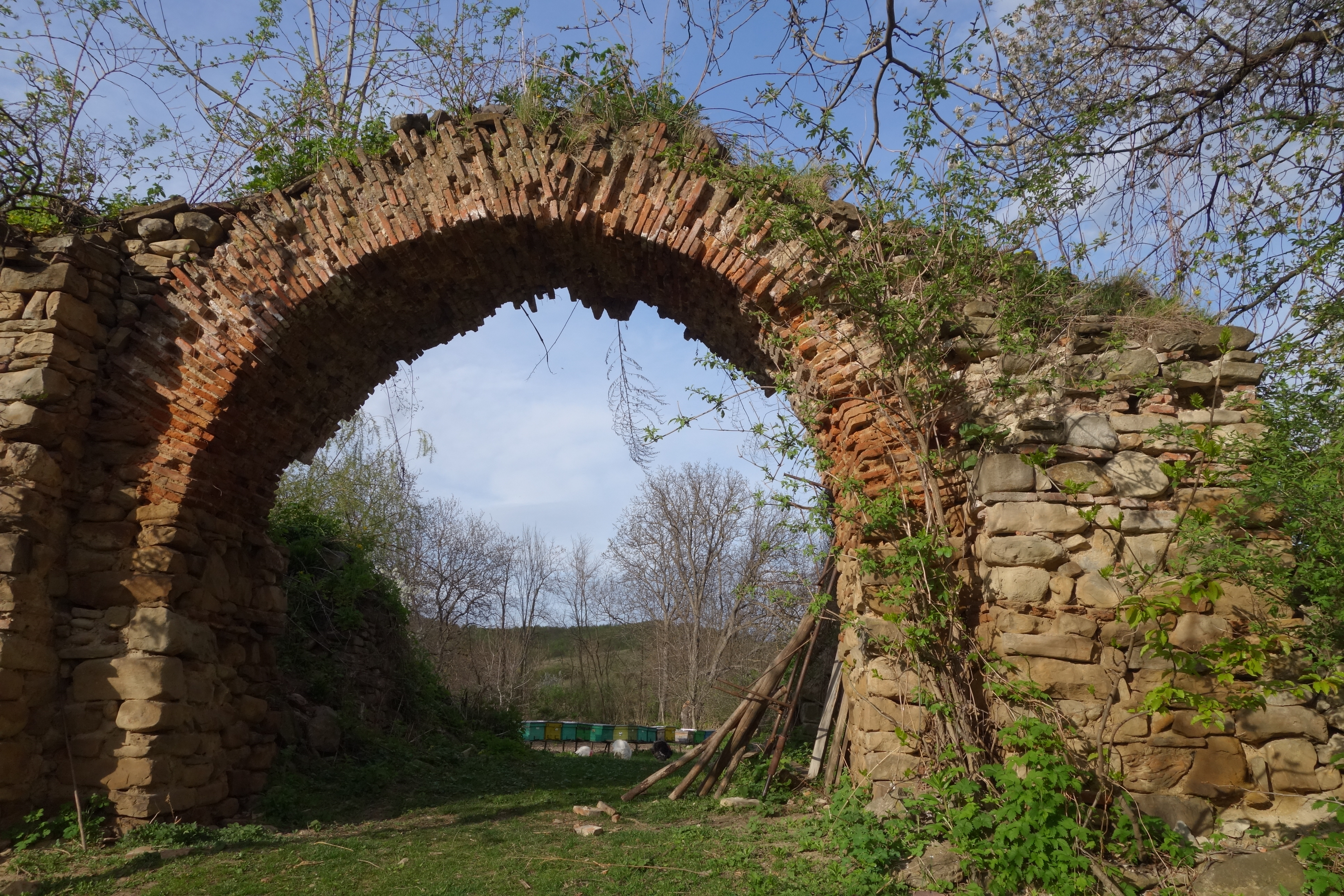 Zid de incintă al fostei mănăstiri Vizantea Livezi 03